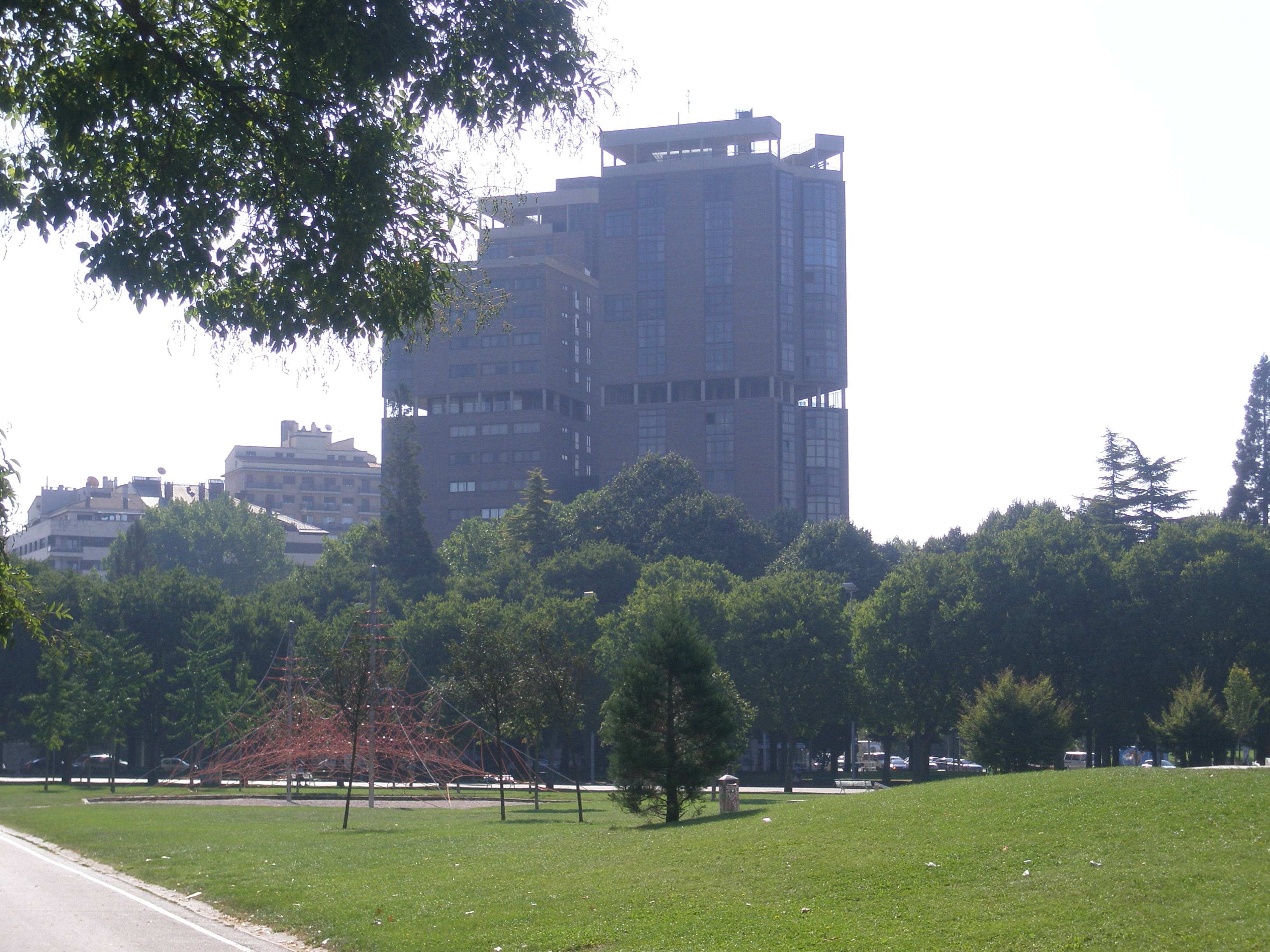 Edificio Singular en Pamplona.